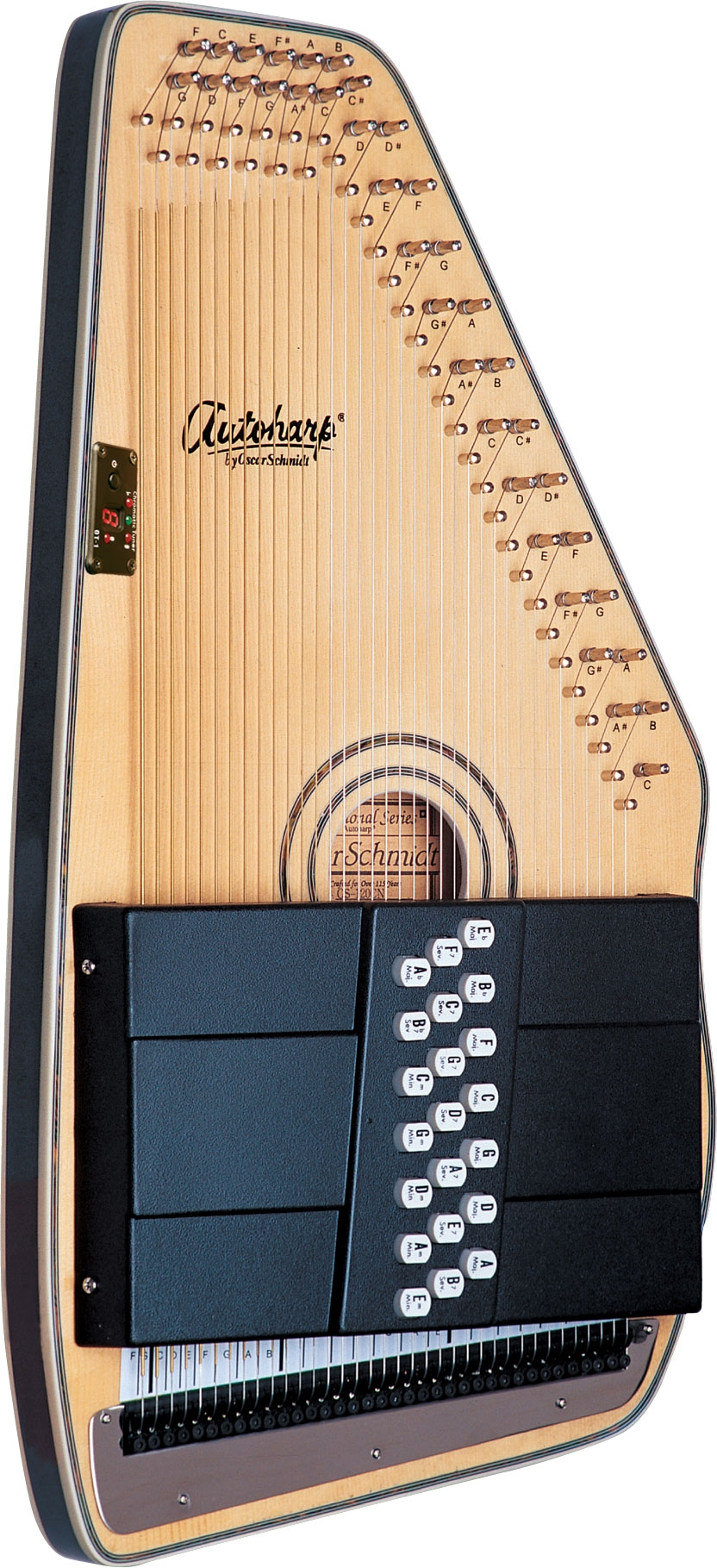 moderne Autoharp mit 3 Knopfreihen und Finetuner